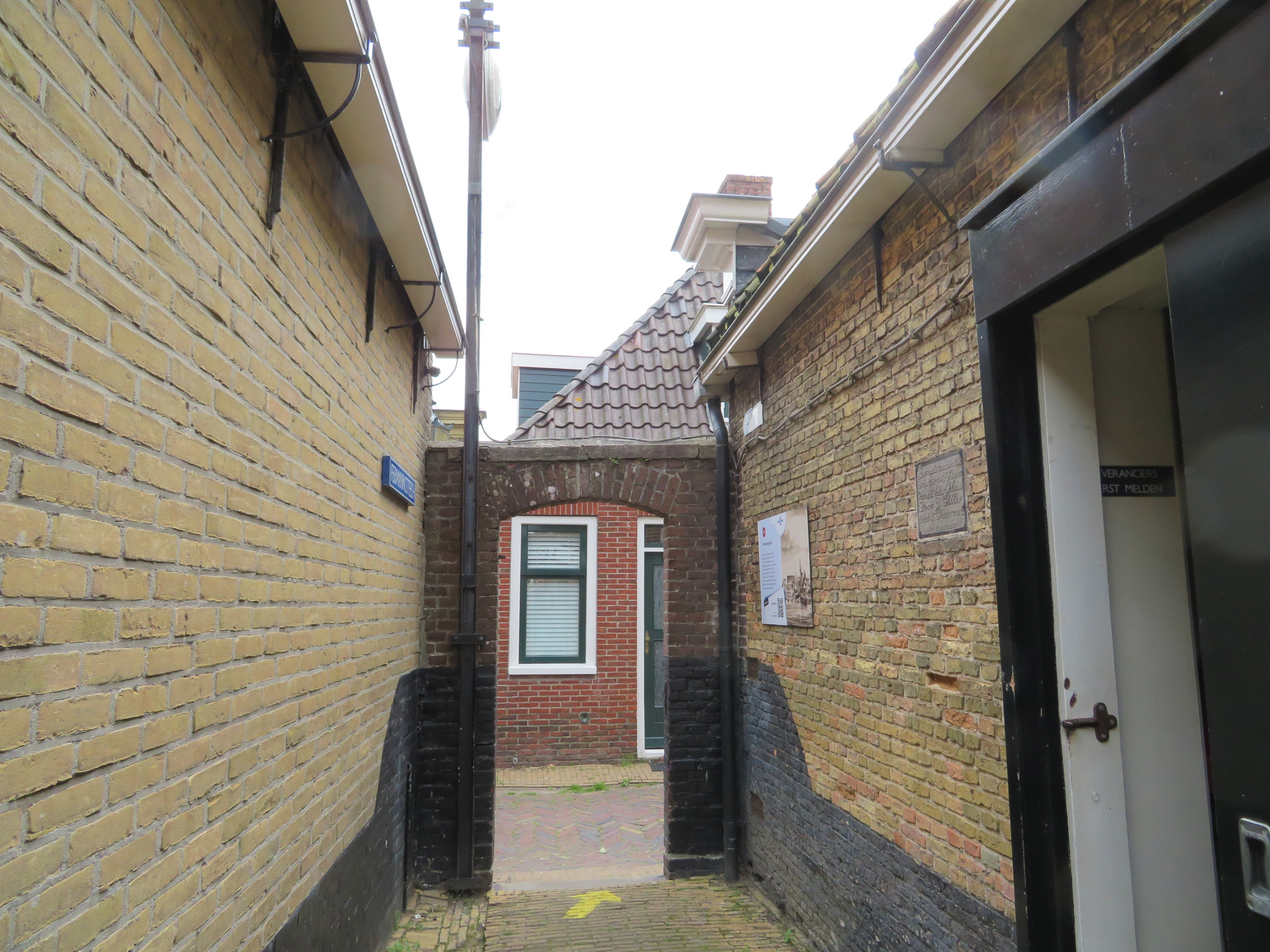 Fermaningsteech Woudsend, Friesland